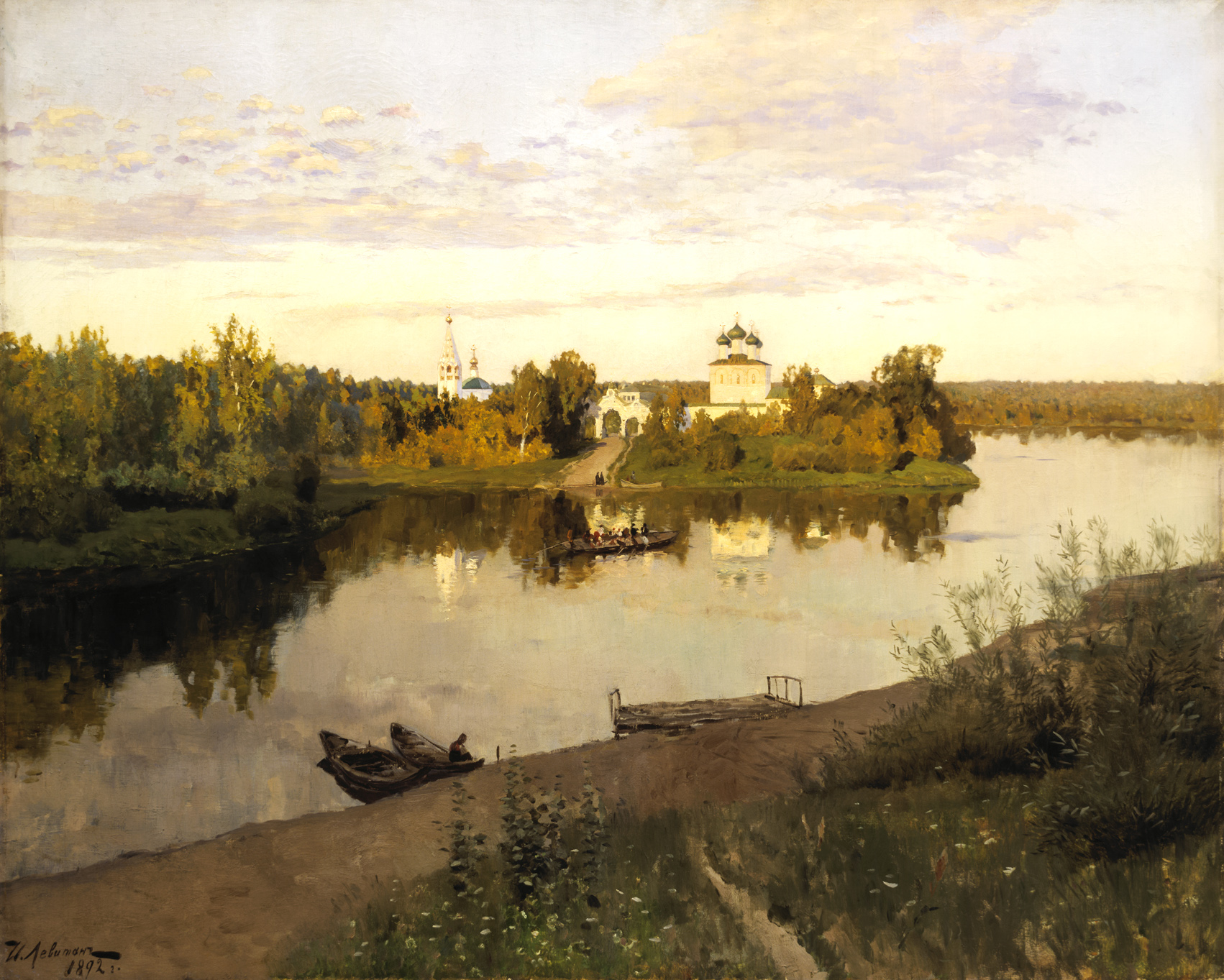 Идея написать картину, изображающую вид монастыря в лучах заходящего солнца, пришла к Левитану, когда он жил в Слободке под Звенигородом, и наблюдал на закате Саввино-Сторожевский монастырь. Два года спустя, уже будучи в Плёсе, в поисках новых мотивов для картин Левитан поехал в Юрьевец, и недалеко от него увидел небольшой монастырь (Кривоезерский монастырь), вид которого возродил у него желание написать такую картину. Таким образом, в сюжете картины переплелись видения этих двух монастырей